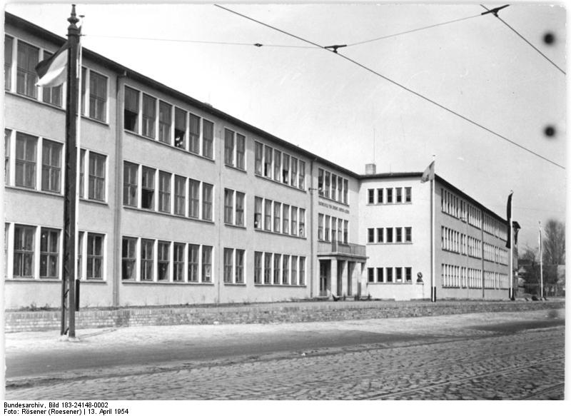 Zentralbild-Rösener Wjtk-Wi. 13.4.1954 Fachschule für Chemie "Justus von Liebig" in Magdeburg-Südost Um weitere hervorragende Kader für die chemische Industrie und die Chemieforschung heranzubilden, wurde in Magdeburg-Südost eine Fachschule für Chemie erbaut, die jetzt den Betrieb aufnahm. Sie erhielt den Namen des grossen deutschen Chemikers und Forschers "Justus von Liebig". UBz, Ansicht der Strassenfront der neuerbauten Fachschule für Chemie Justus von Liebig."